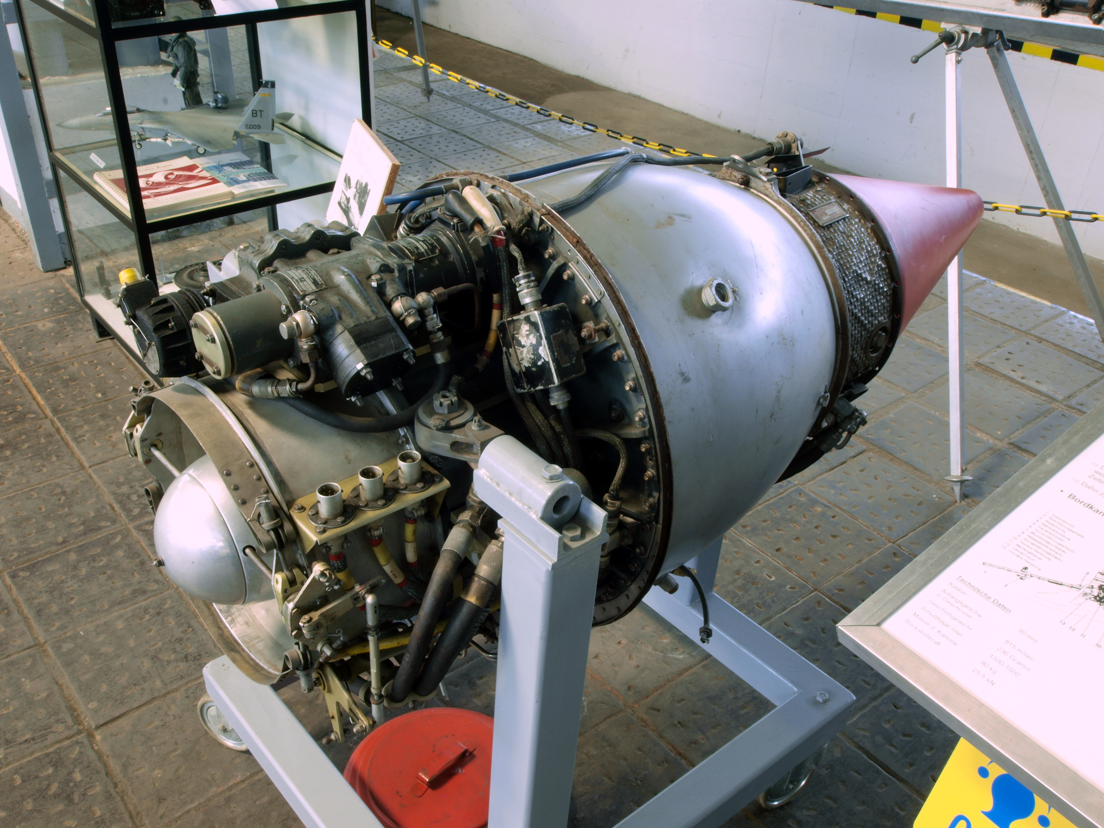 Turbomeca Marboré II F3